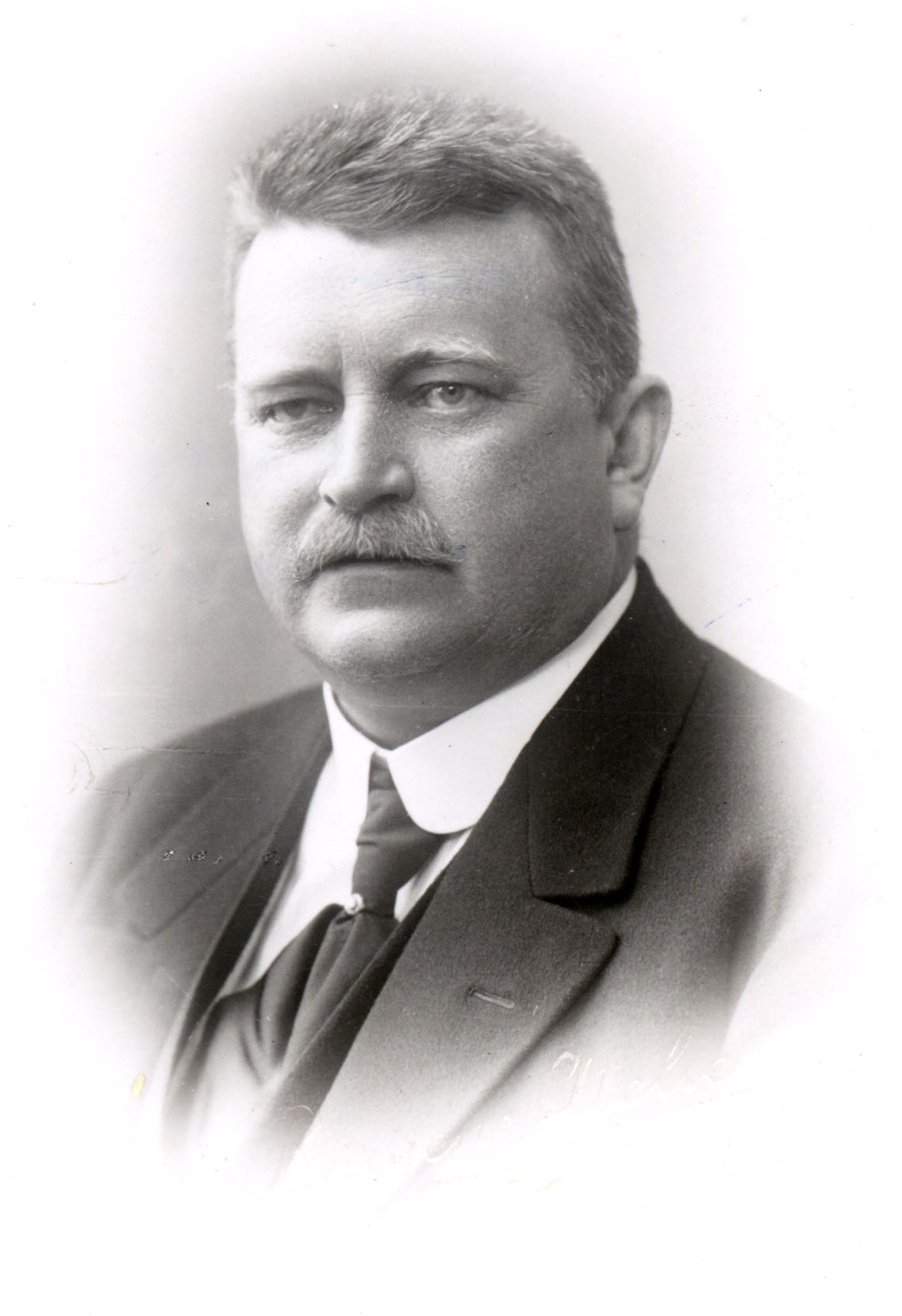 Cornelius Middelthon (1869–1934), statsråd og stortingsmann (Høyre).